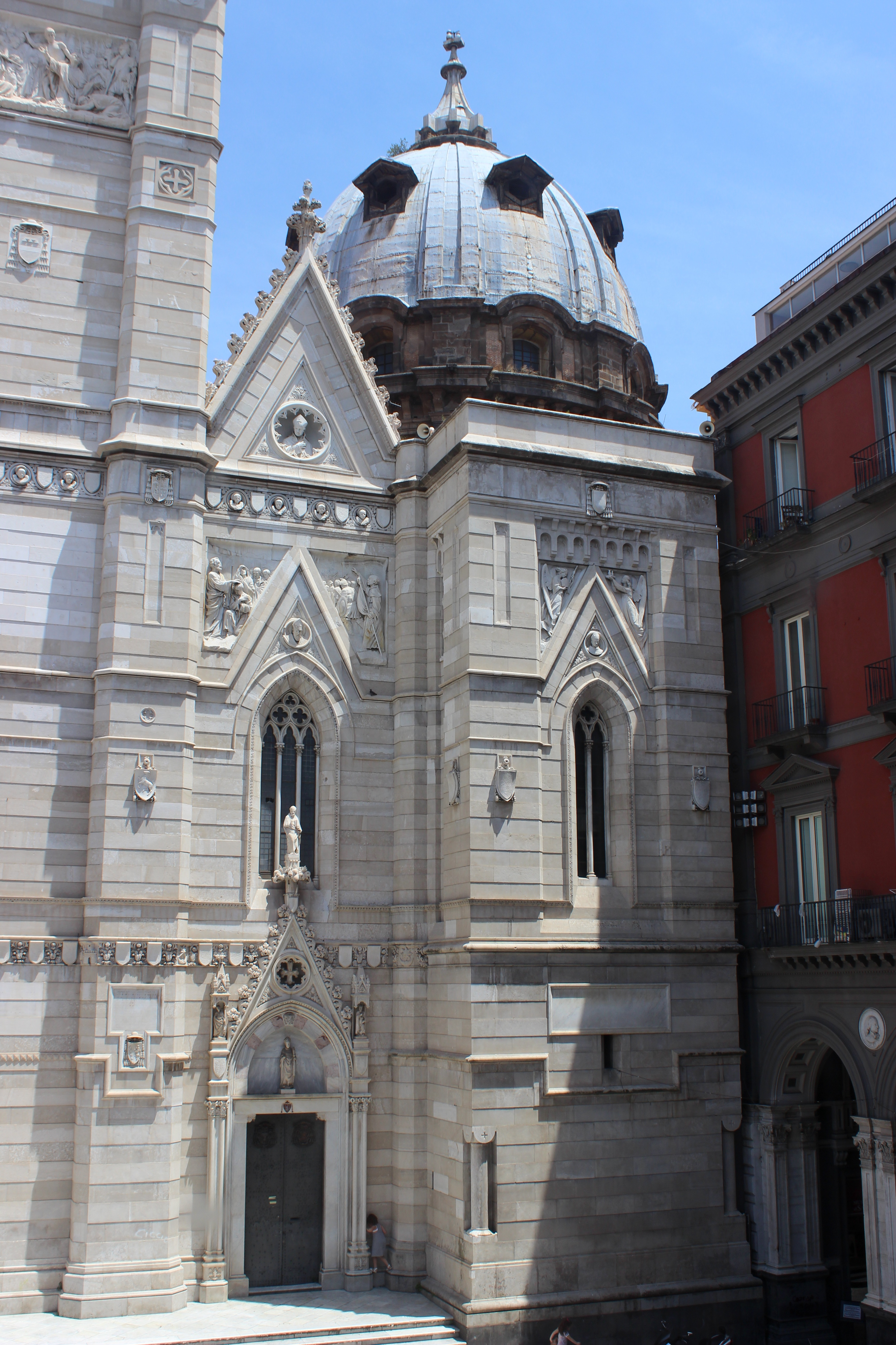 Catedral de Nápoles. Fachada principal.